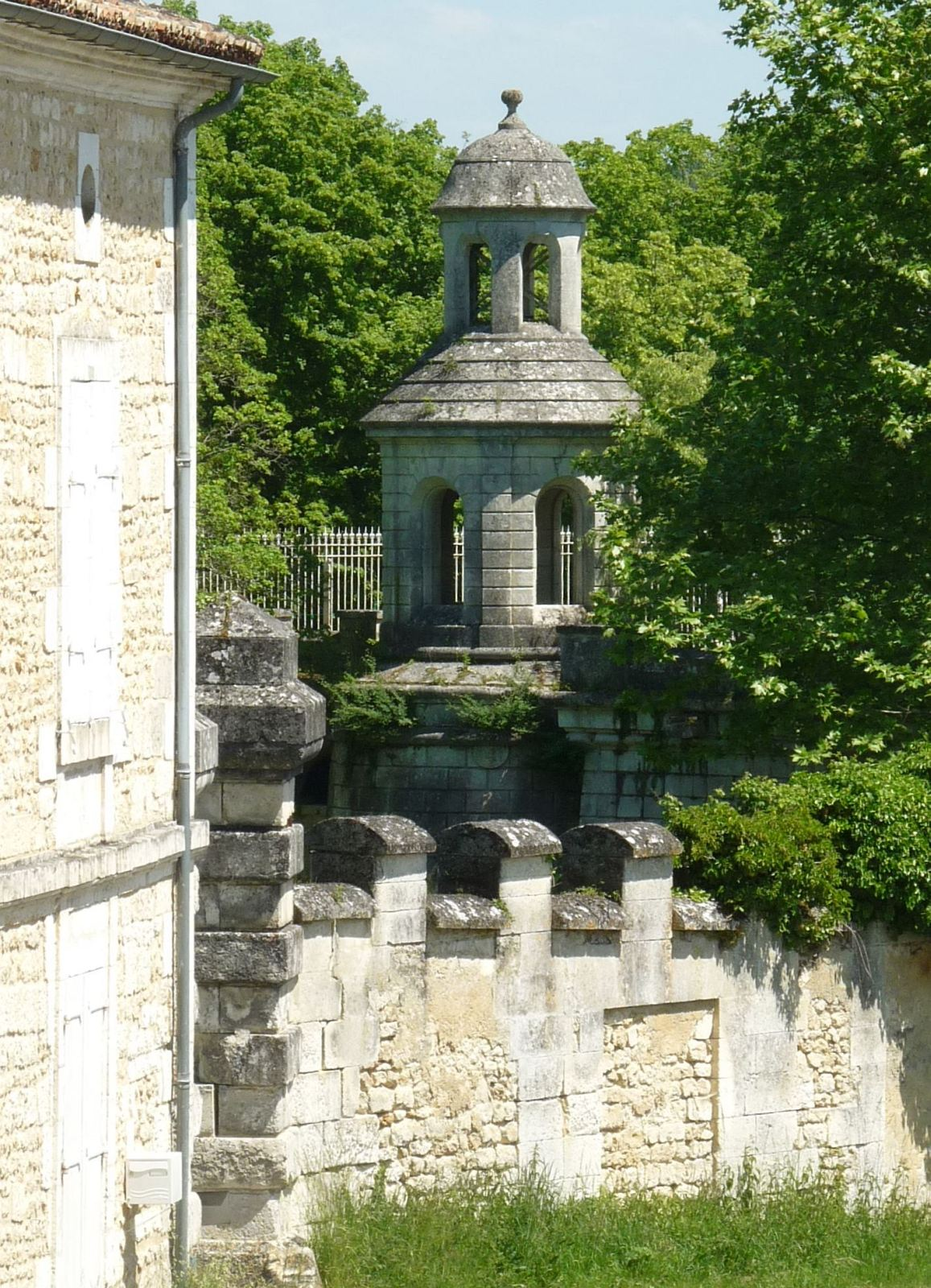 château de La Rochebeaucourt, Edon, Charente, France